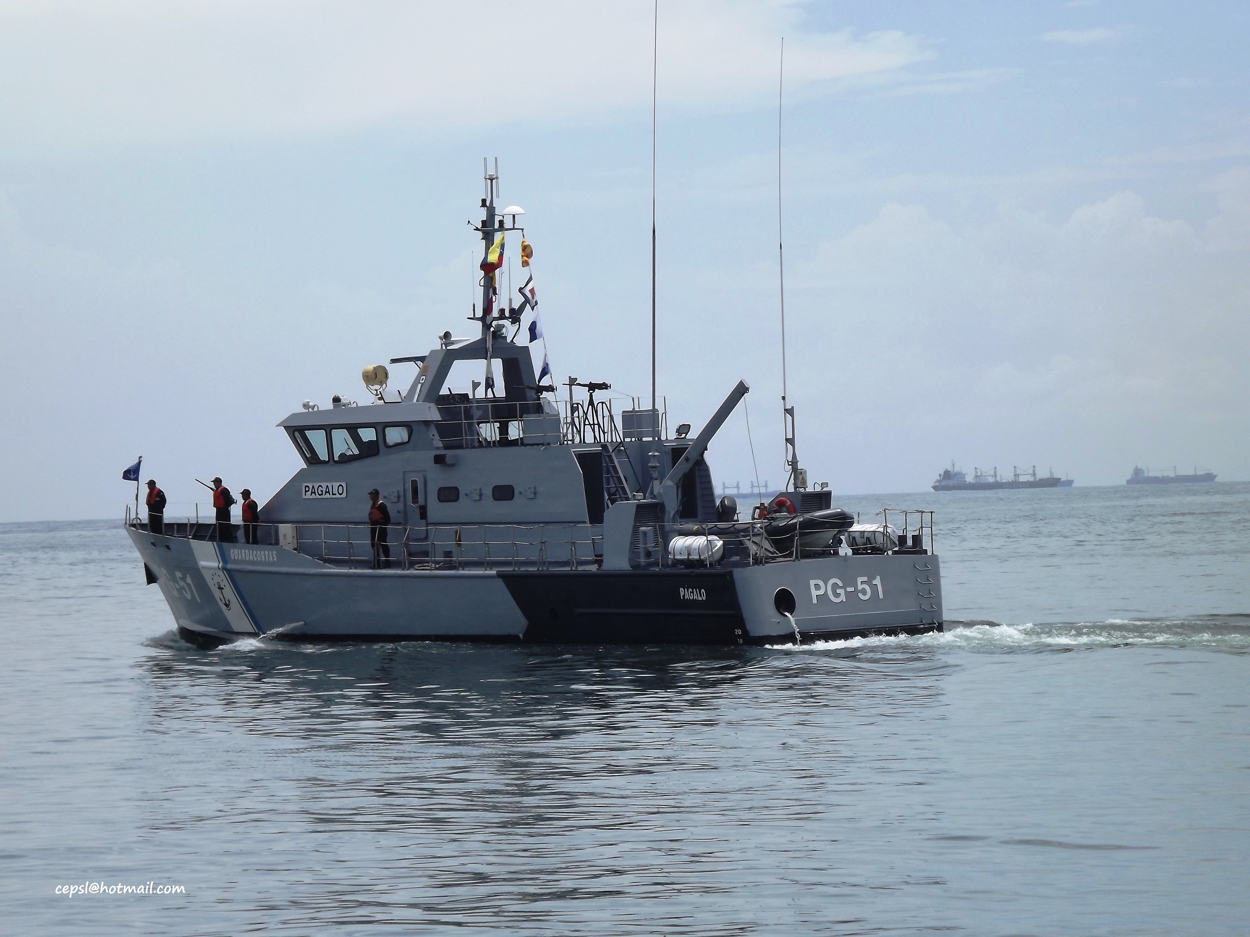 PG-51 Pegalo clase Págalo tipo PB (Damen Stan Patrol 2606)